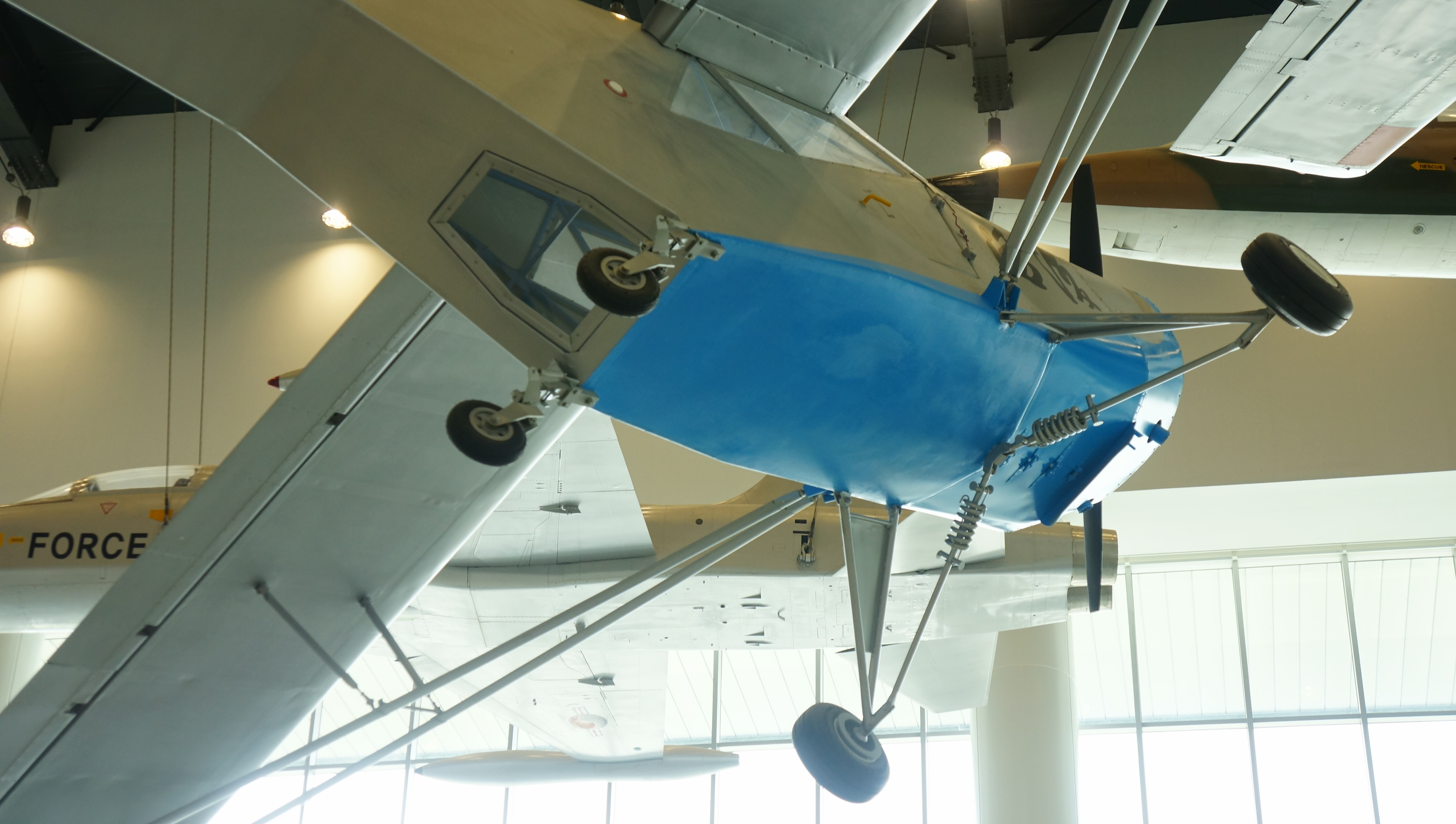 大韓民国空軍 プファル（復活）号 レプリカ 後部胴体拡大。 2014年6月6日 済州航空宇宙博物館内にて。